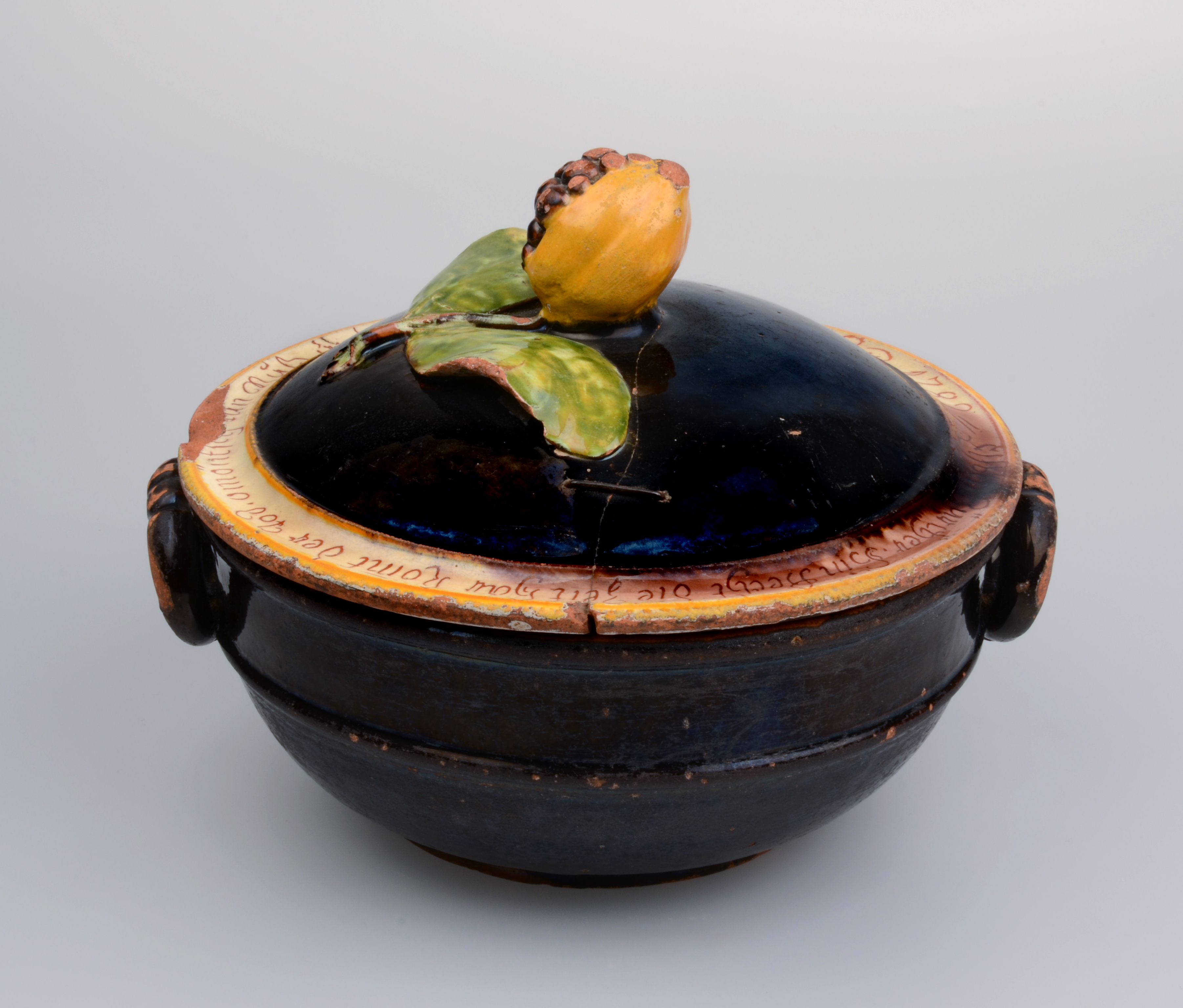 Terrine, Herstellungsort Langnau im Emmental